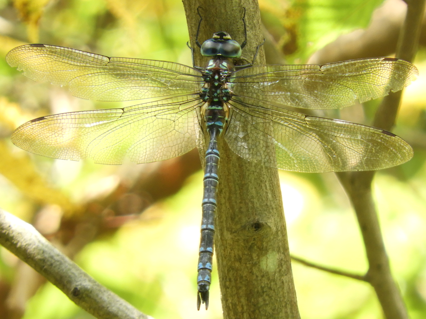 オオルリボシヤンマ雄 広島県